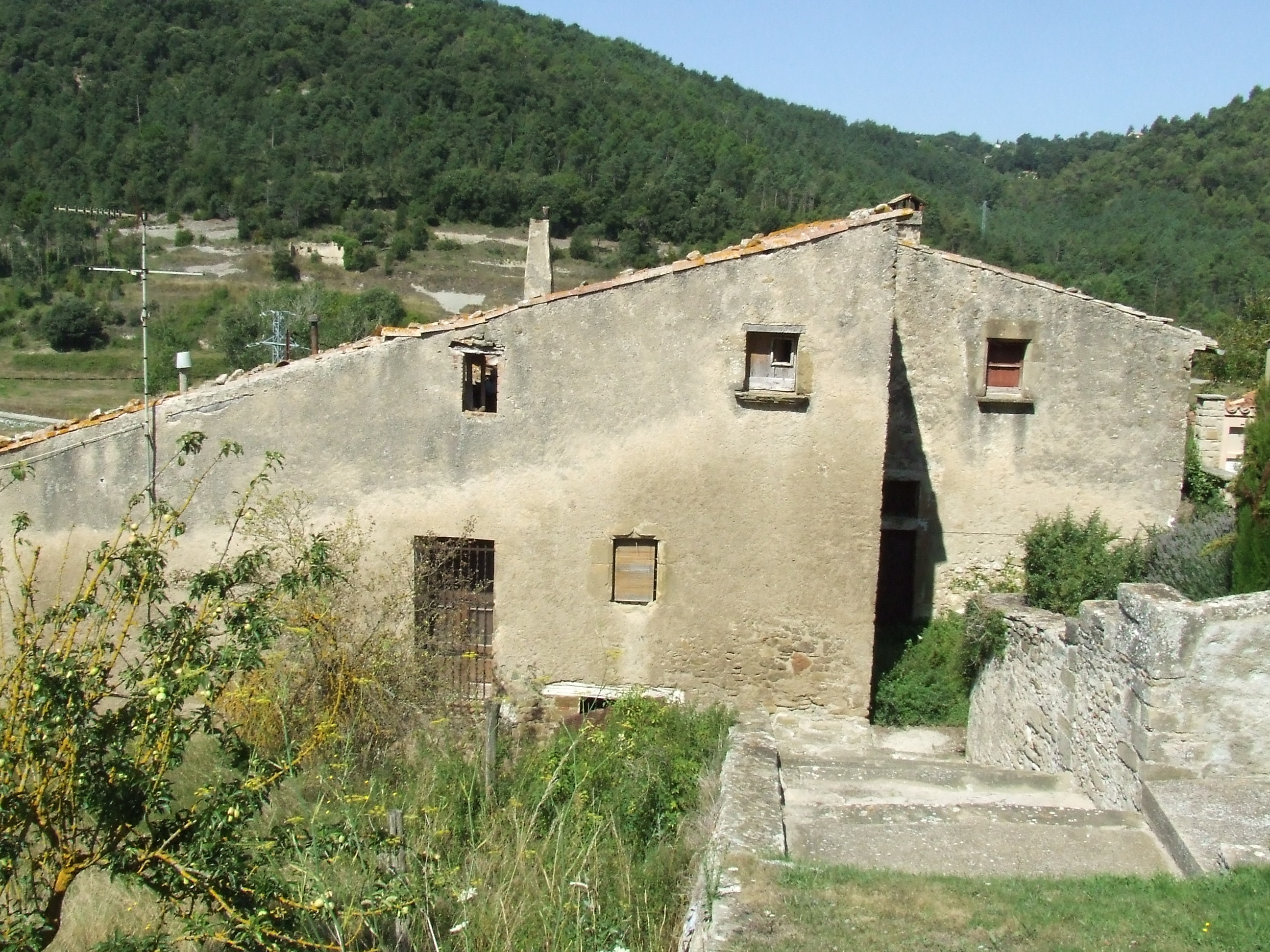 Cal Tomàs i la Rectoria (Castellcir, Moianès)